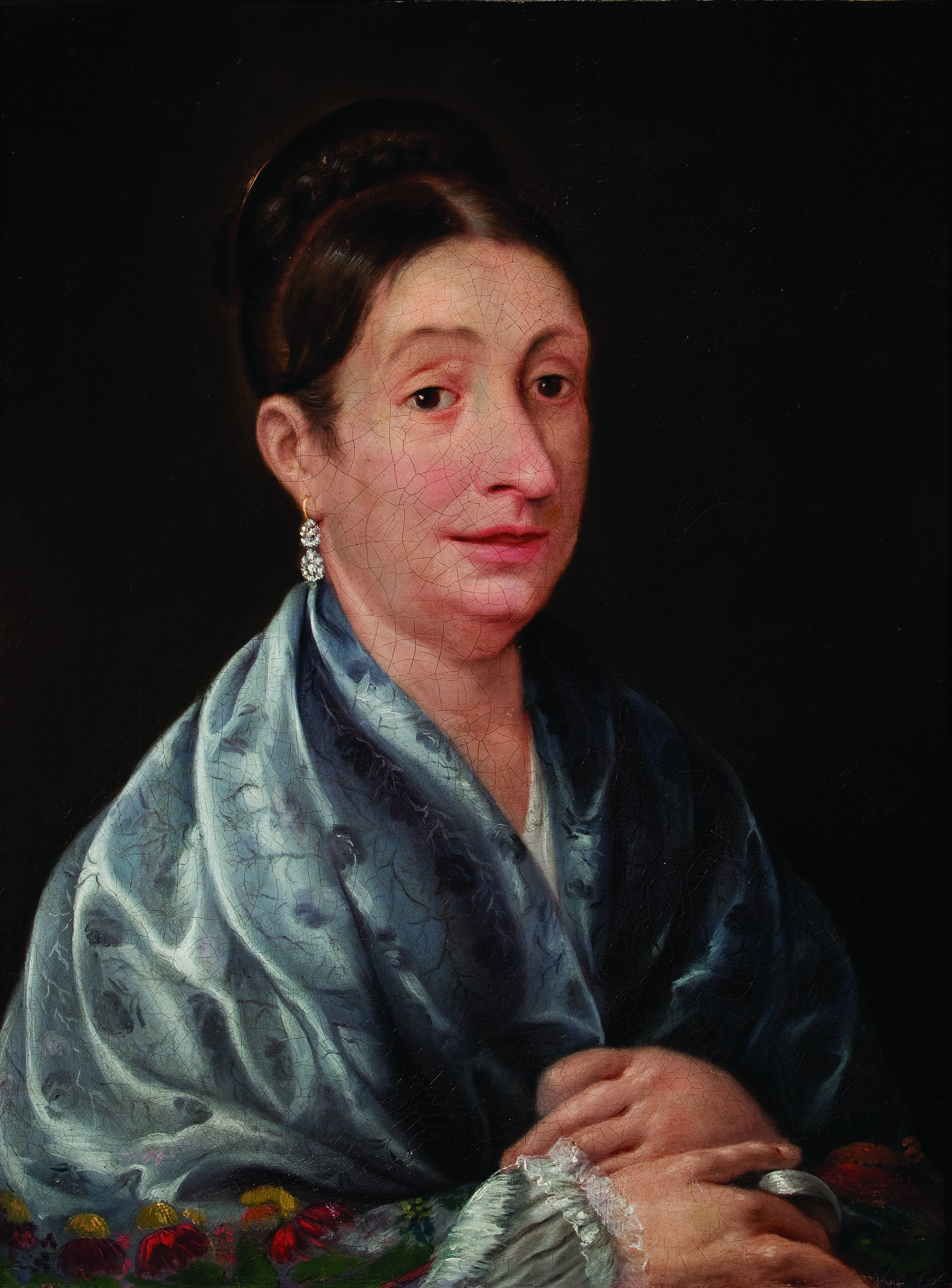 Retrato of Josefa Ortiz de Domínguez (1768-1829)